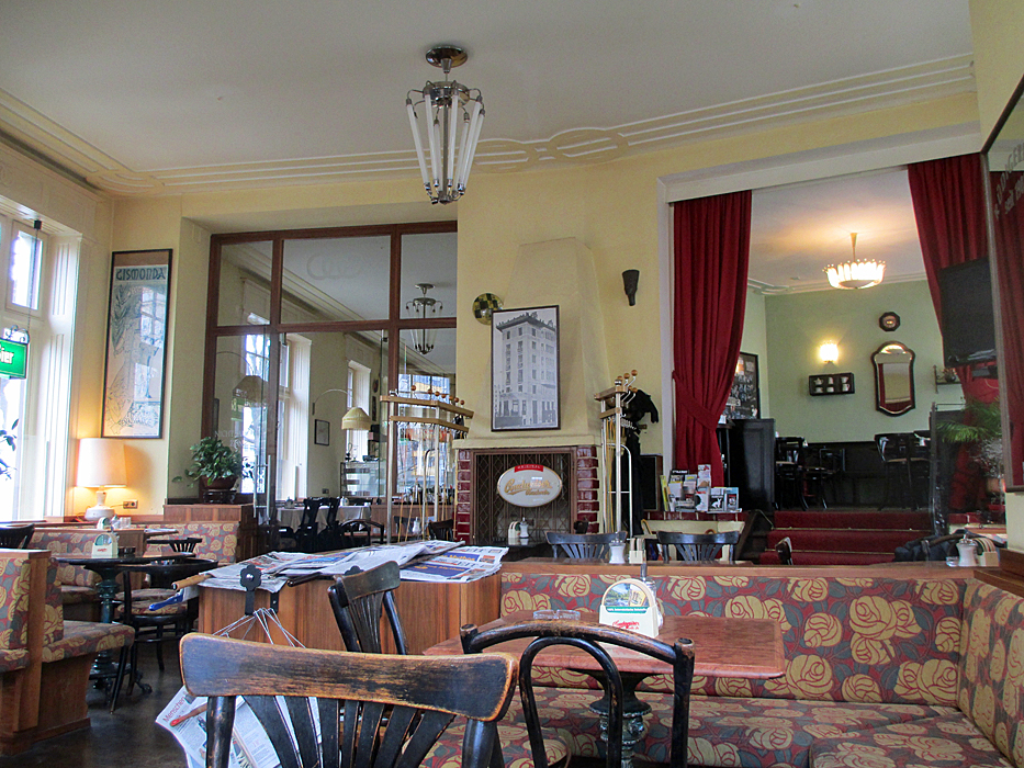 Im Café Rüdigerhof, Wien